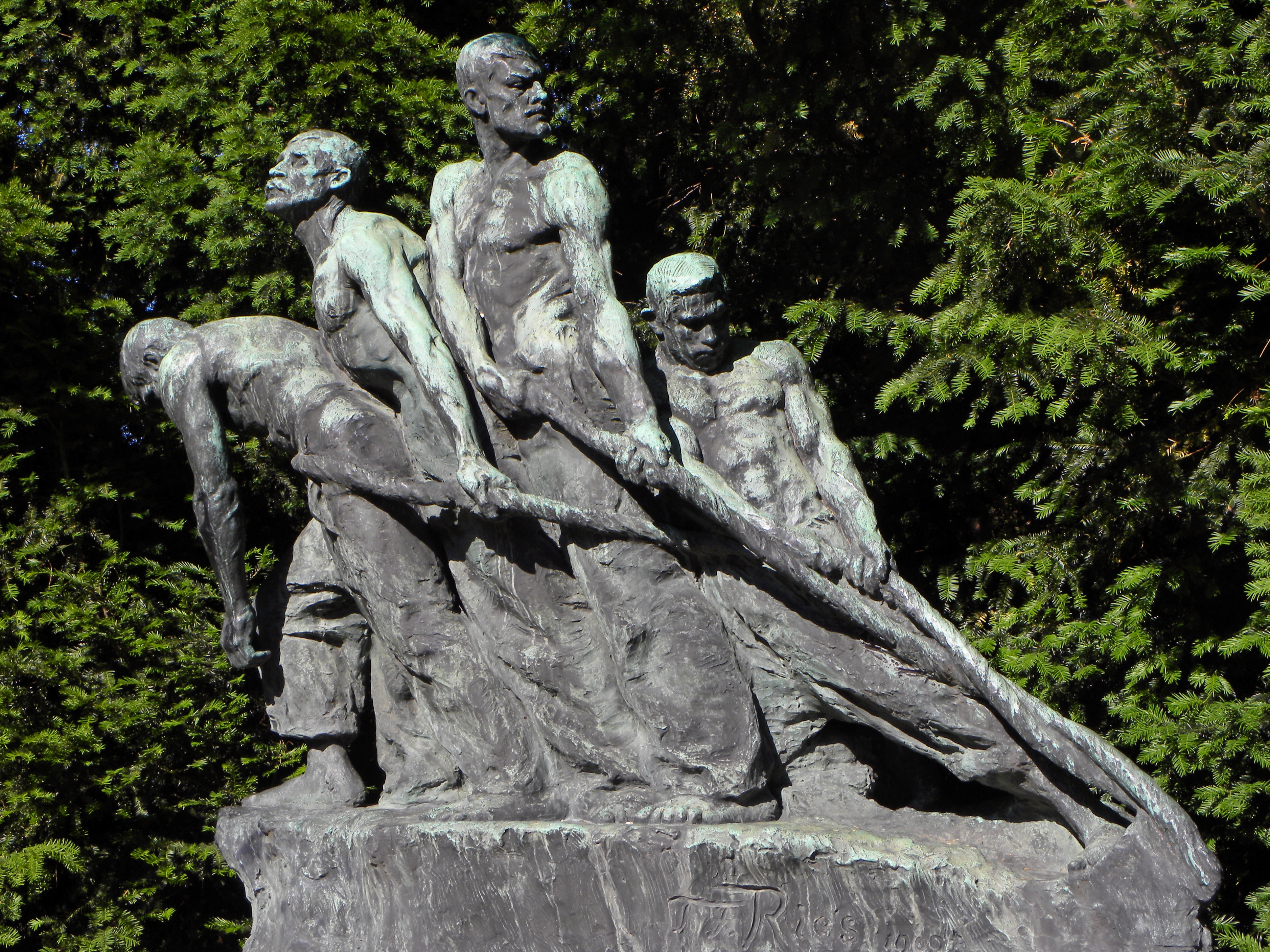 Gartenbaudenkmale im Kongresspark